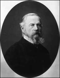 Gustaf Ranin (1825–1896)